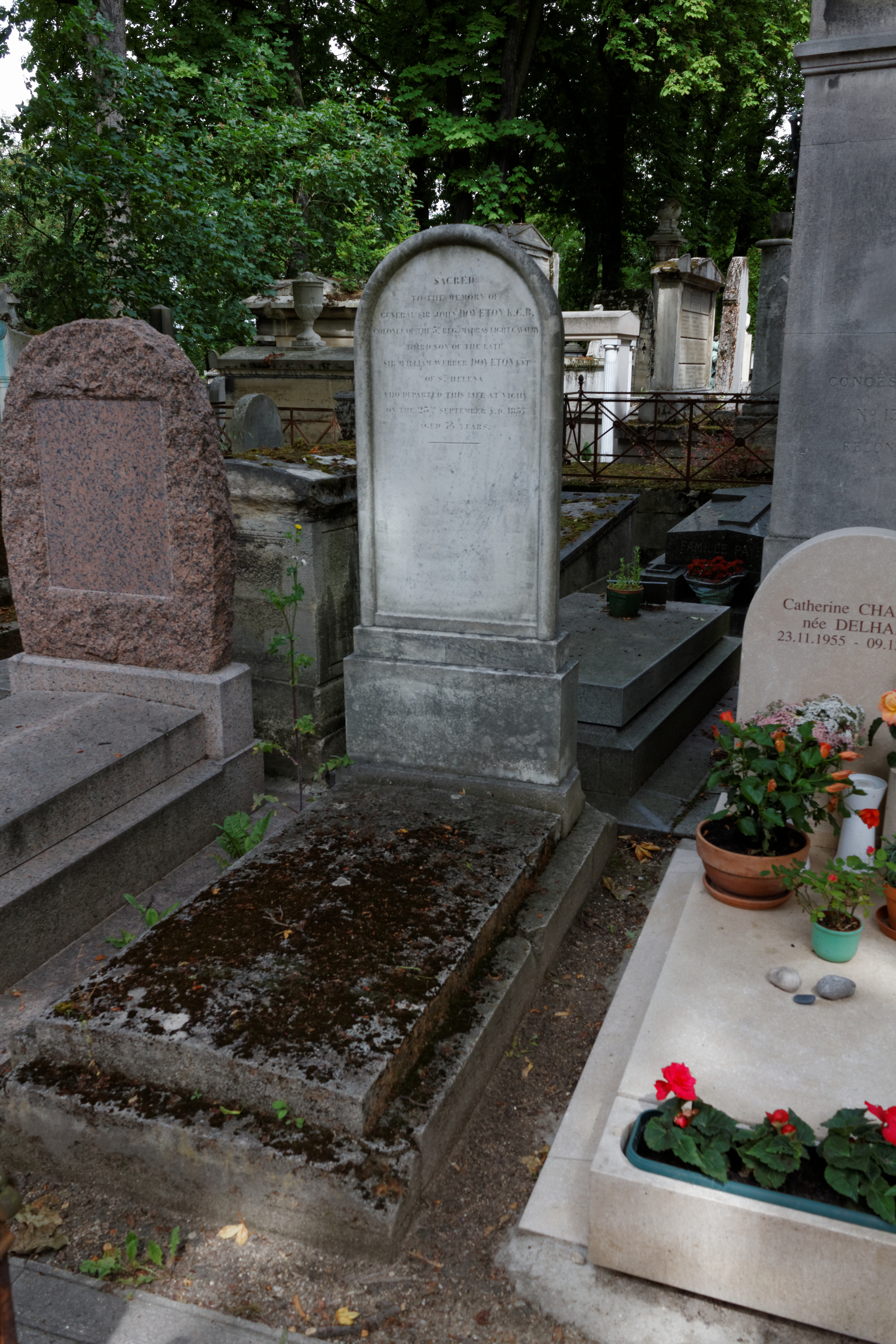 Vue d'ensemble